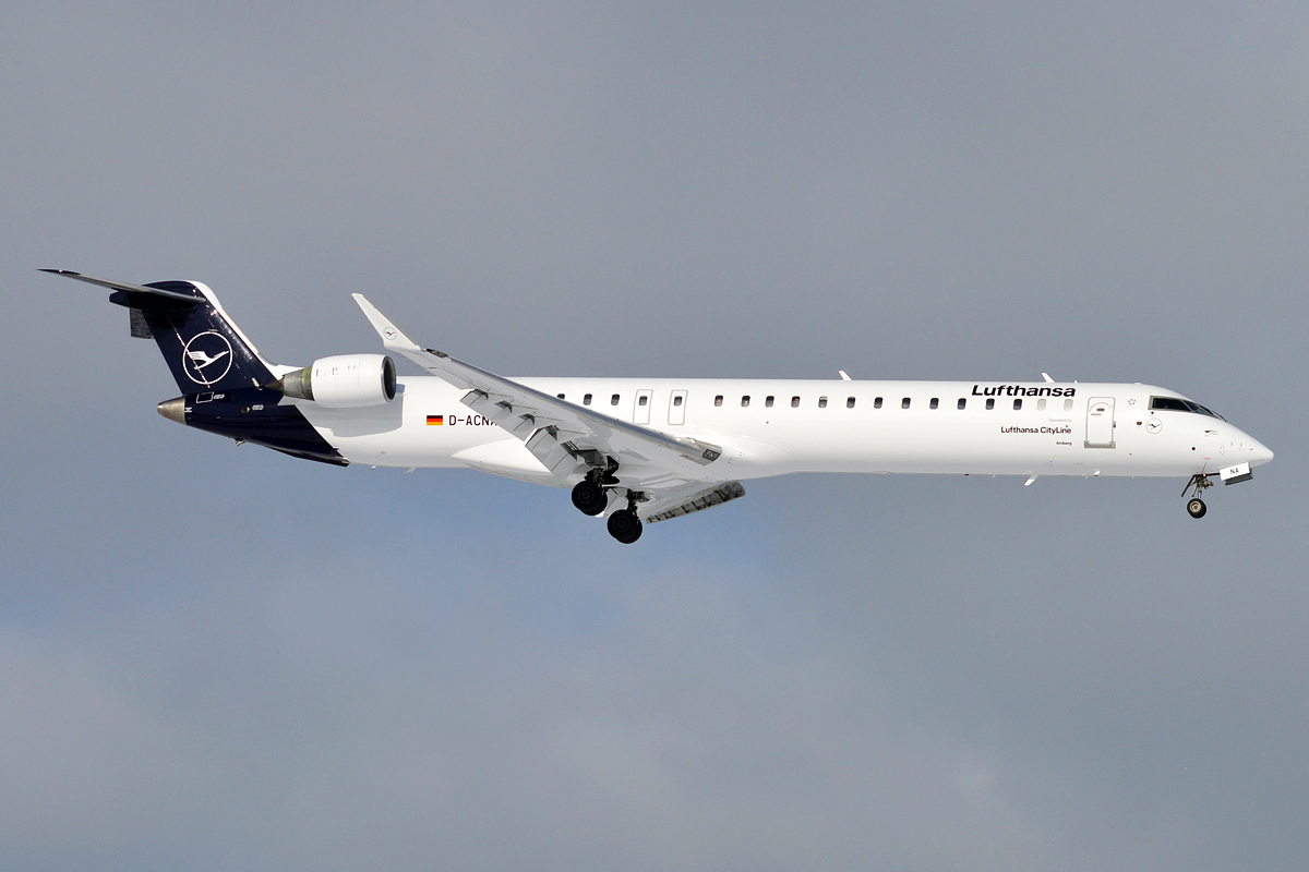 Lufthansa CityLine, D-ACNA, Bombardier CRJ-900LR